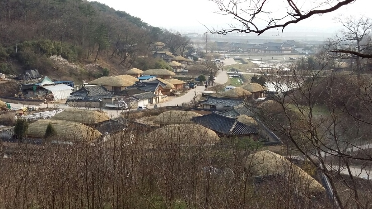 한국어 (조선): 양동마을 전경